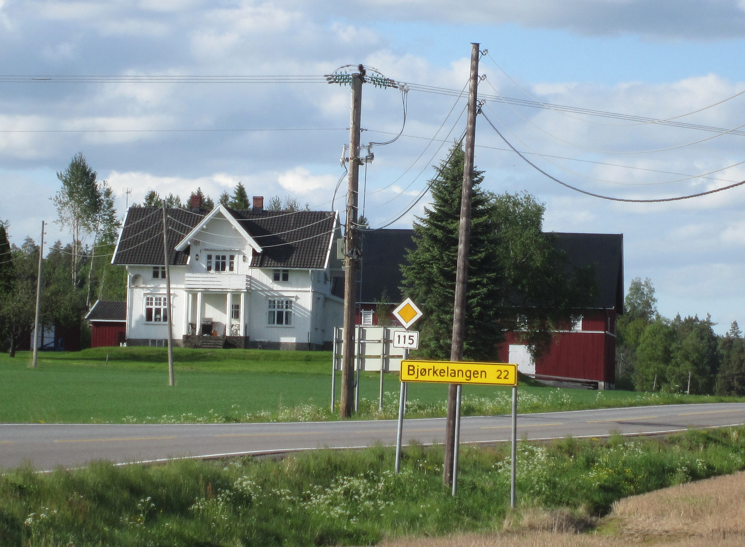 Primær fylkesvei 115 ved Hemnes